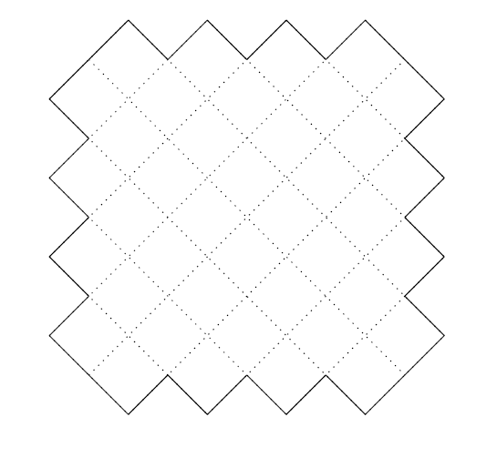 Diamant aztèque vide